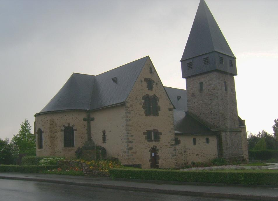 Eglise Saint Nicolas de Coulaines Sarthe